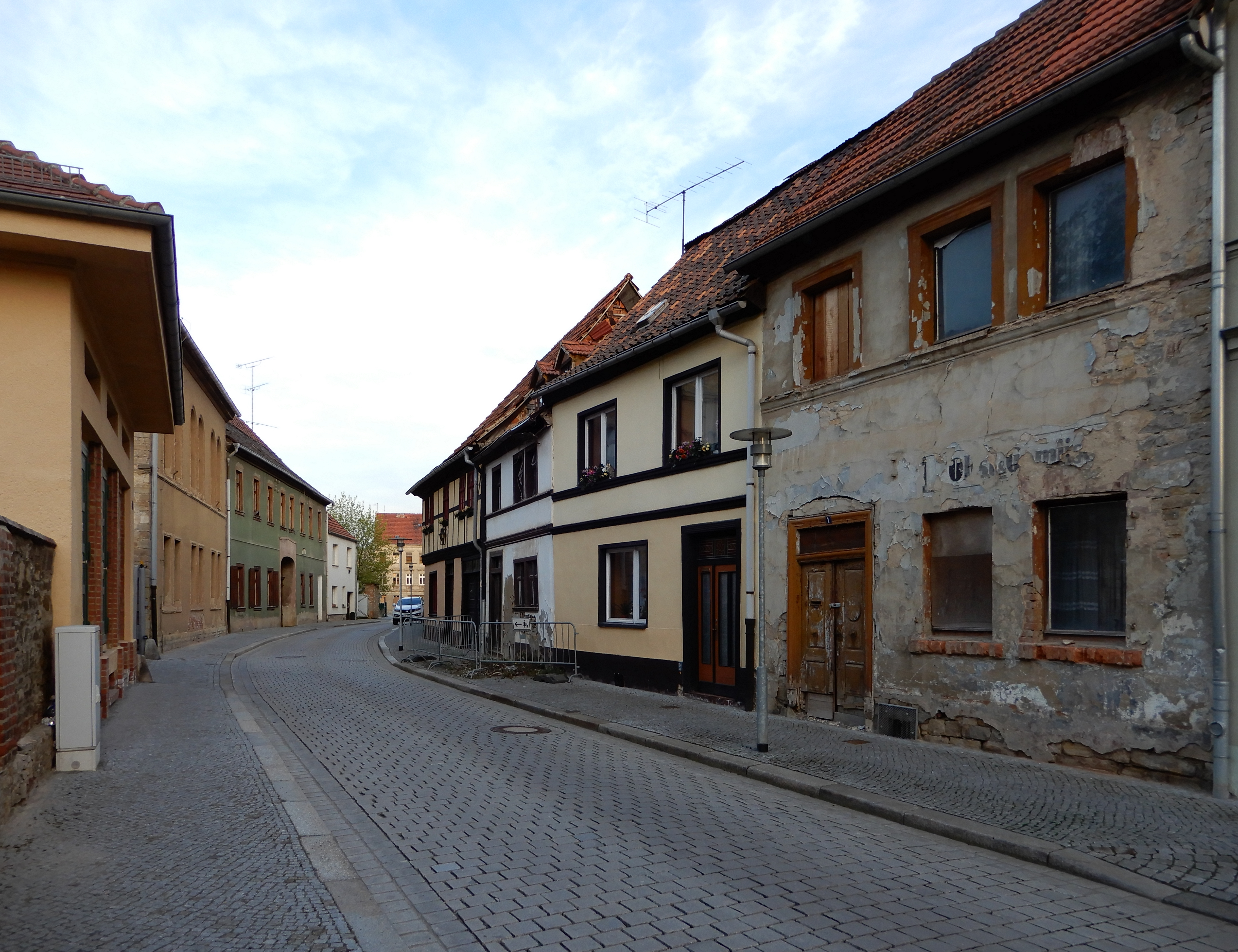 Gebäude in der Fleischhauerstraße in Aschersleben